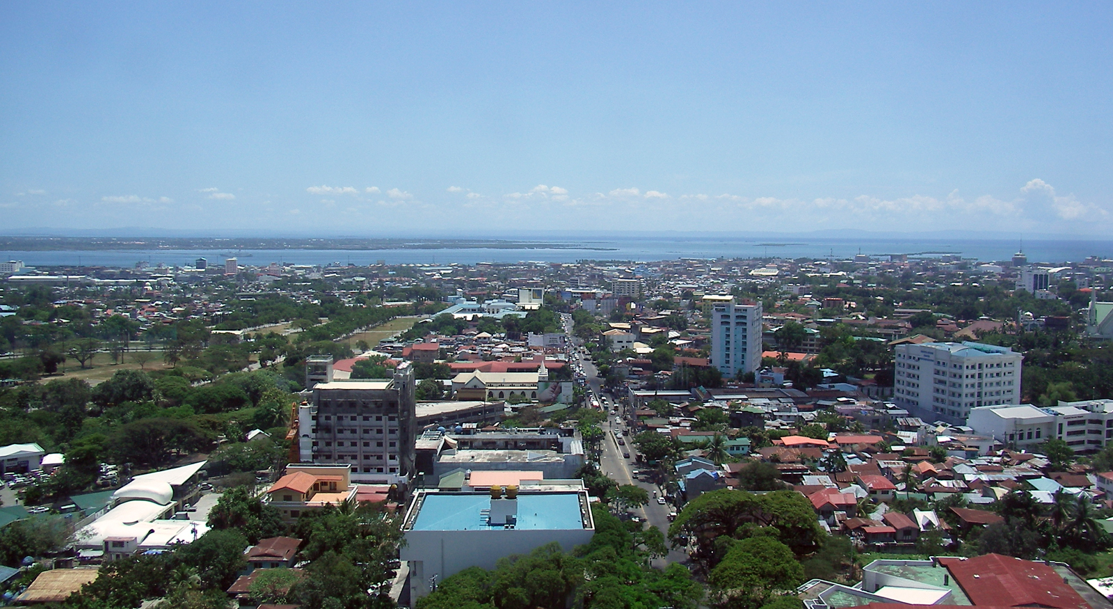 Panorama von Cebu-Stadt, fotografiert vom Golden Peak Tower Richtung Mactan